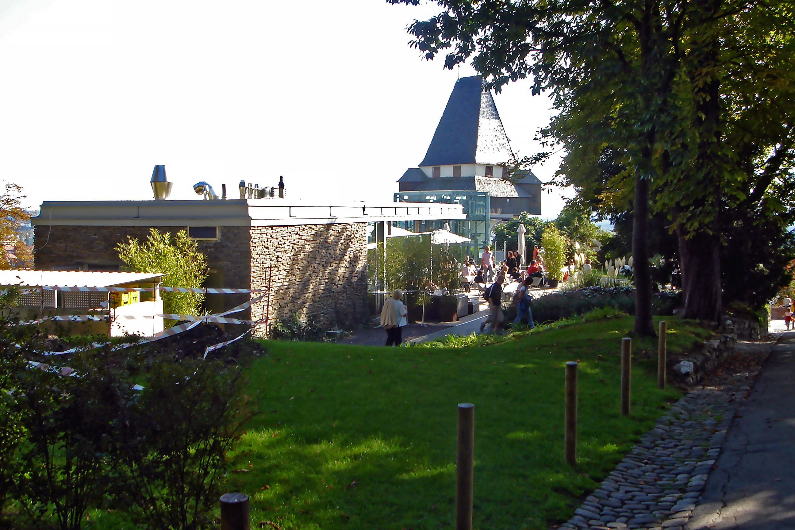 Graz, Schloßberg ON 2, Café-Bar aiola sowie Liftgebäude (Anschnitt) im Bereich der vormaligen Gärtnerei, Uhrturm